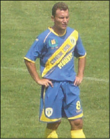 Pompiliu Stoica - Petrolul Ploiesti